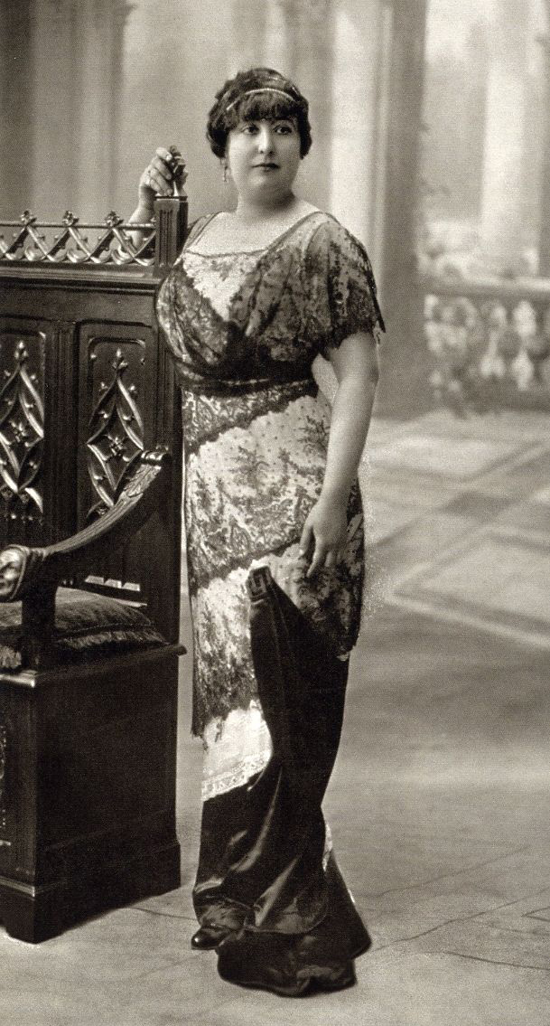 Retrato de Carmen de Burgos y Seguí.